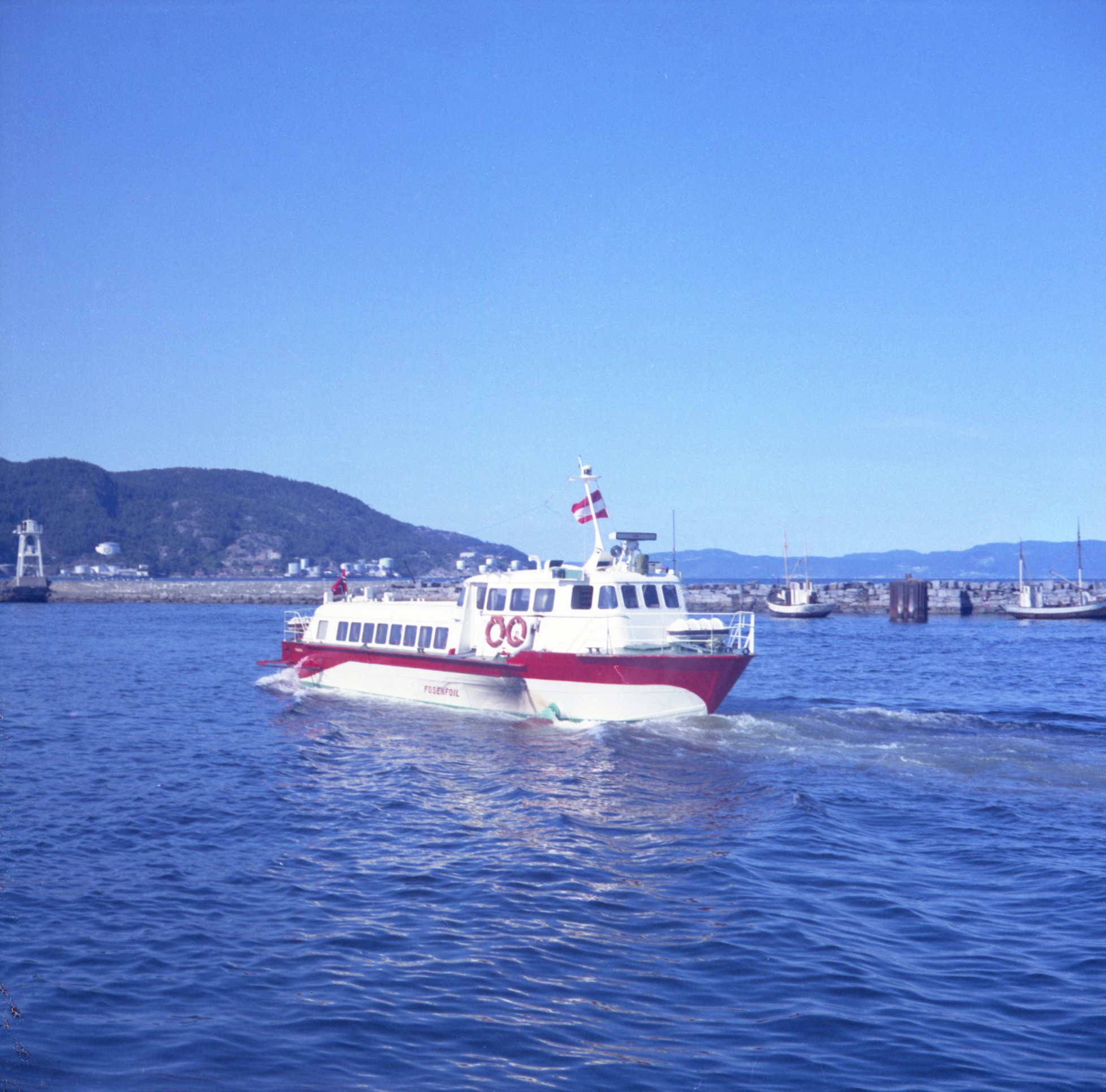 Format: Fotonegativ Film: 4x4 Kodacolor-X Dato / Date: 22. August 1971 Kl. 11:30 Fotograf / Photographer Fritz Digre (1897 – 1992) Sted / Place: Brattørbassenget, Trondheim Wikipedia: Hurtigbåt Eier / Owner Institution: Trondheim byarkiv, The Municipal Archives of Trondheim Arkivreferanse / Archive reference: Tor.H43.B81.F30075 HB «Fosenfoil» 1963: Levert av Westermoen Hydrofoil A/S, Mandal som b.nr. 3 - «Sundfoil II» til A/B Sundtrafikk, Helsingborg. Tonnasje: 68 brt. Hoveddim.: Loa x Bmld x D = 67'-6" x 16'-7" x 8'-1" Kapasitet: 62 passasjerer Maskineri: 1 stk. Daimler-Benz, 1350 bhk. Ruteområde: Øresund. 1964: Solgt til A/S Masl, Oslo uten navneskifte. 1968: Omdøpt til «Nisen» 1969: Solgt til Fosen Trafikklag A/S, for trafikk på Tr.heim-Brekstad-Hitra og Tr.heim-Leksvik-Frosta uten navneskifte. 1970: Omdøpt til «Fosenfoil» 1974: Tatt ut av trafikken og solgt til Italia for fart mellom Italia og Sicilia. Omdøpt til «Freccia di Procida». Finn R. Hansen: Fosen Trafikklag A/S Trondheim - Flåteliste 1904-1994 (1994) s. 47